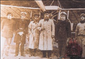 Primeros pilotos navales Primeros oficiales navales que recibieron instrucción en la recientemente creada Escuaela Aeronáutica Militar de El Bosque, Santiago, el año 1916. El primer marino en calificar como piloto fue el Contador 3º Carlos Yánquez Cerda. Foto tomada de Revista de Marina.